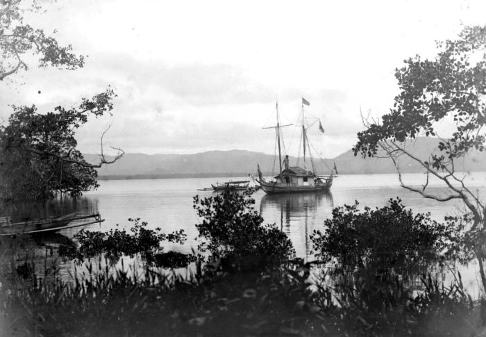 Negatief. Een zeilboot in de Orembaai ter hoogte van de bocht van Piroe, genomen vanaf een ruïne op Ceram